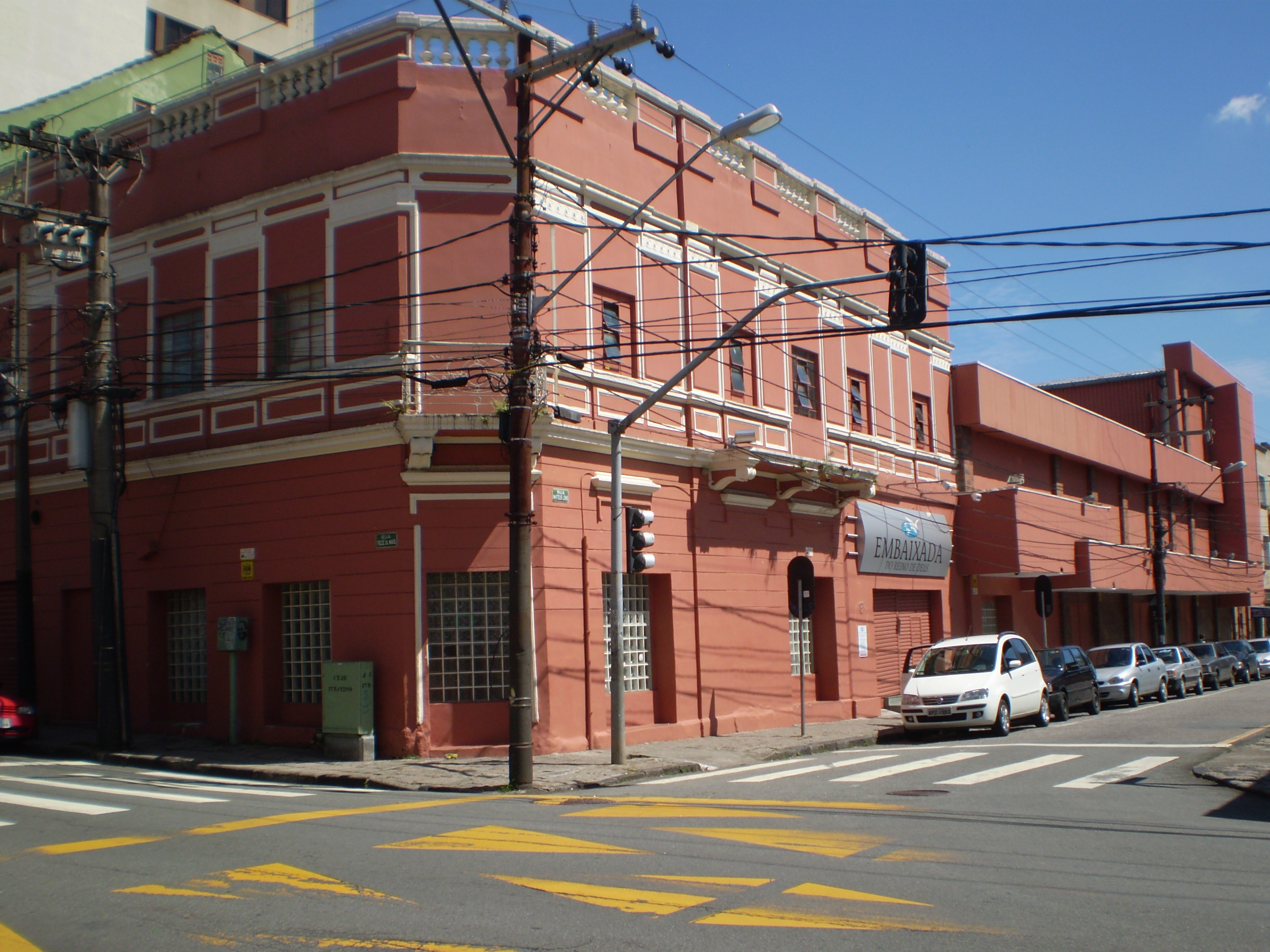 Prédio do antigo Theatro Hauer na esquina da Mateus Leme com a Treze de Maio em Curitiba